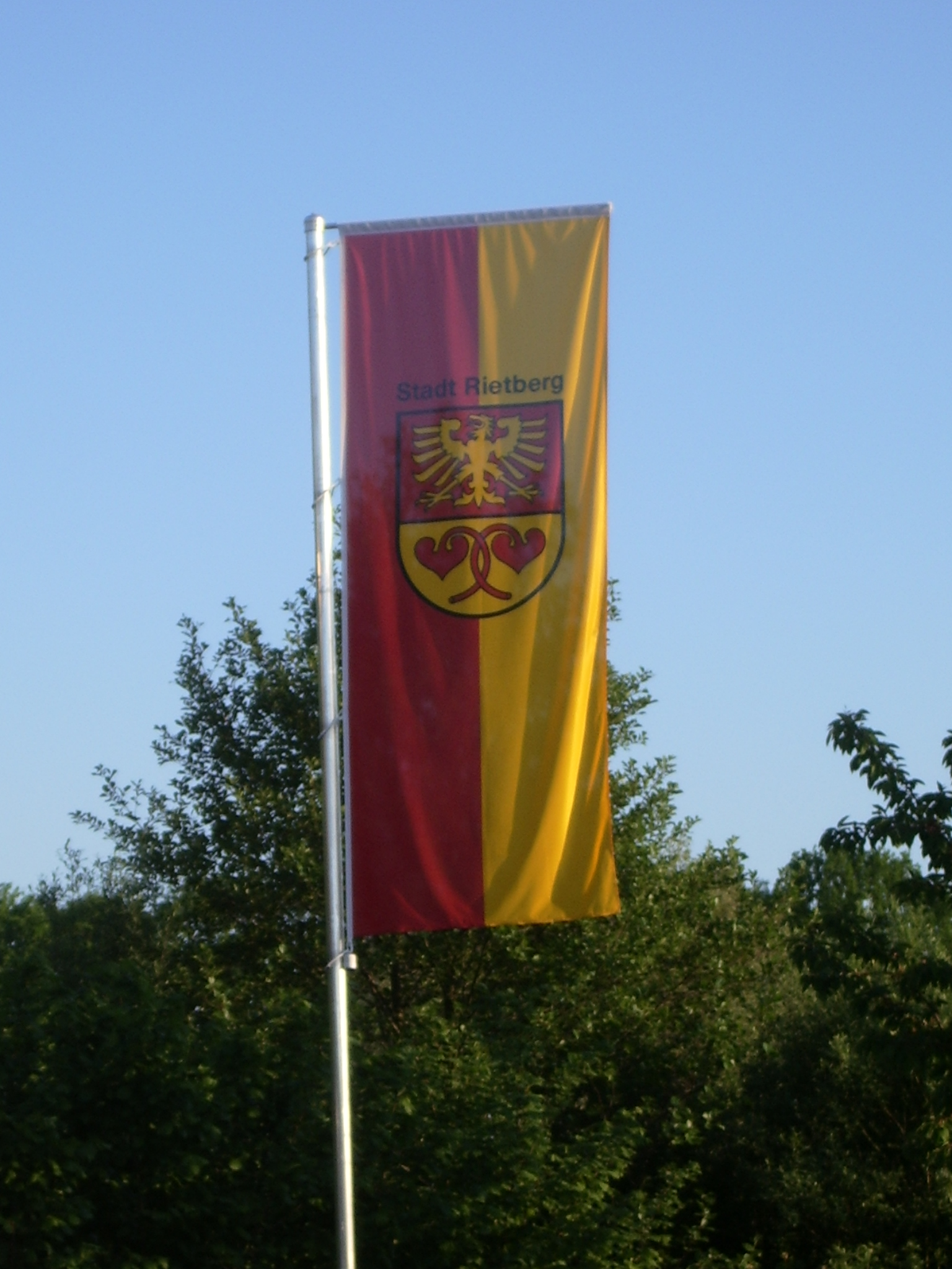 Auslegerflagge der Stadt Rietberg (Foto)